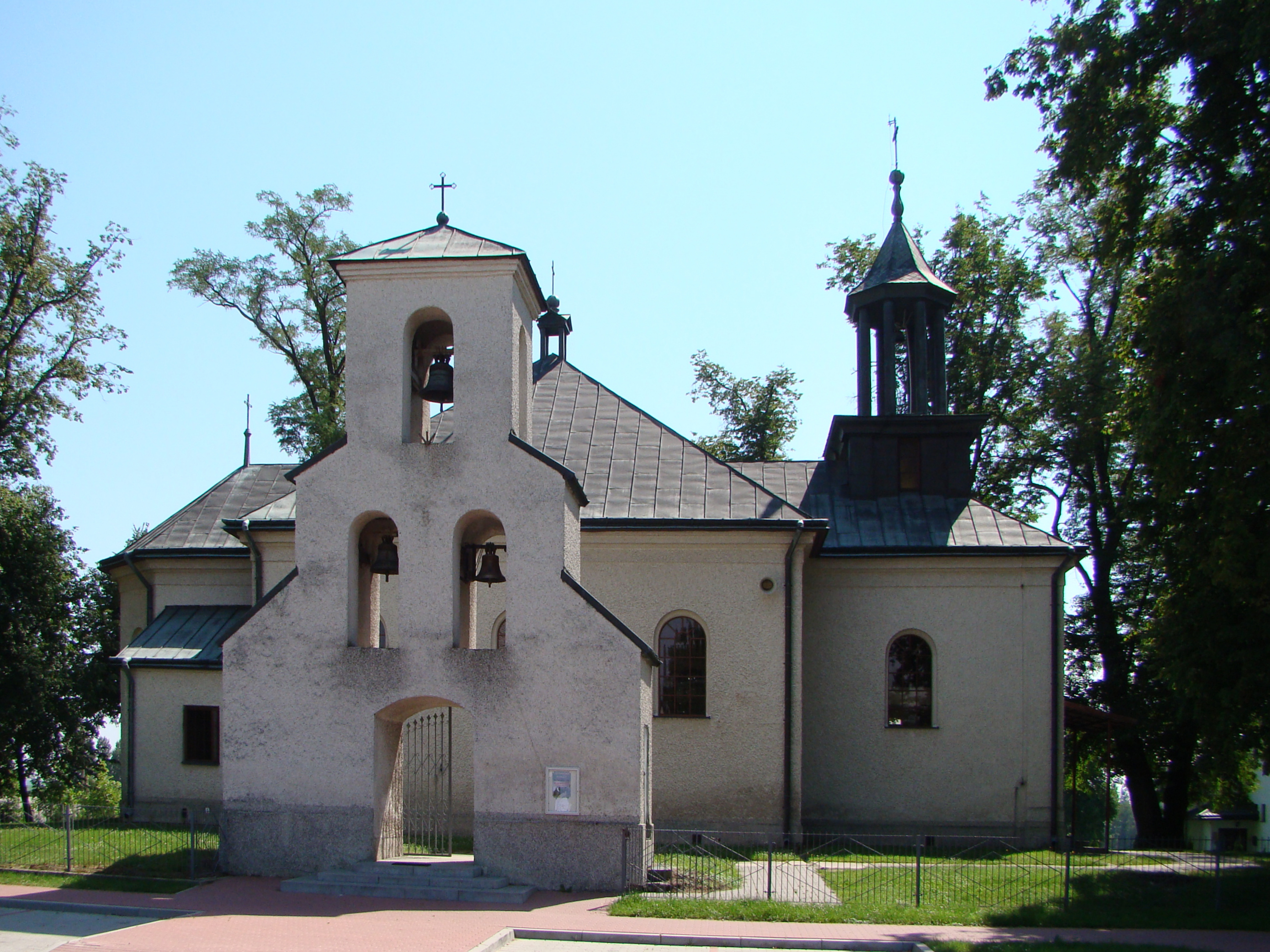 Kostel nanebevstoupení Panny Marie v obci Obsza, Polsko